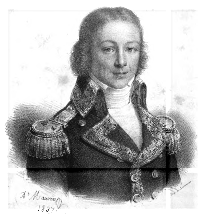 Charles René Magon de Médine (1763-1805)